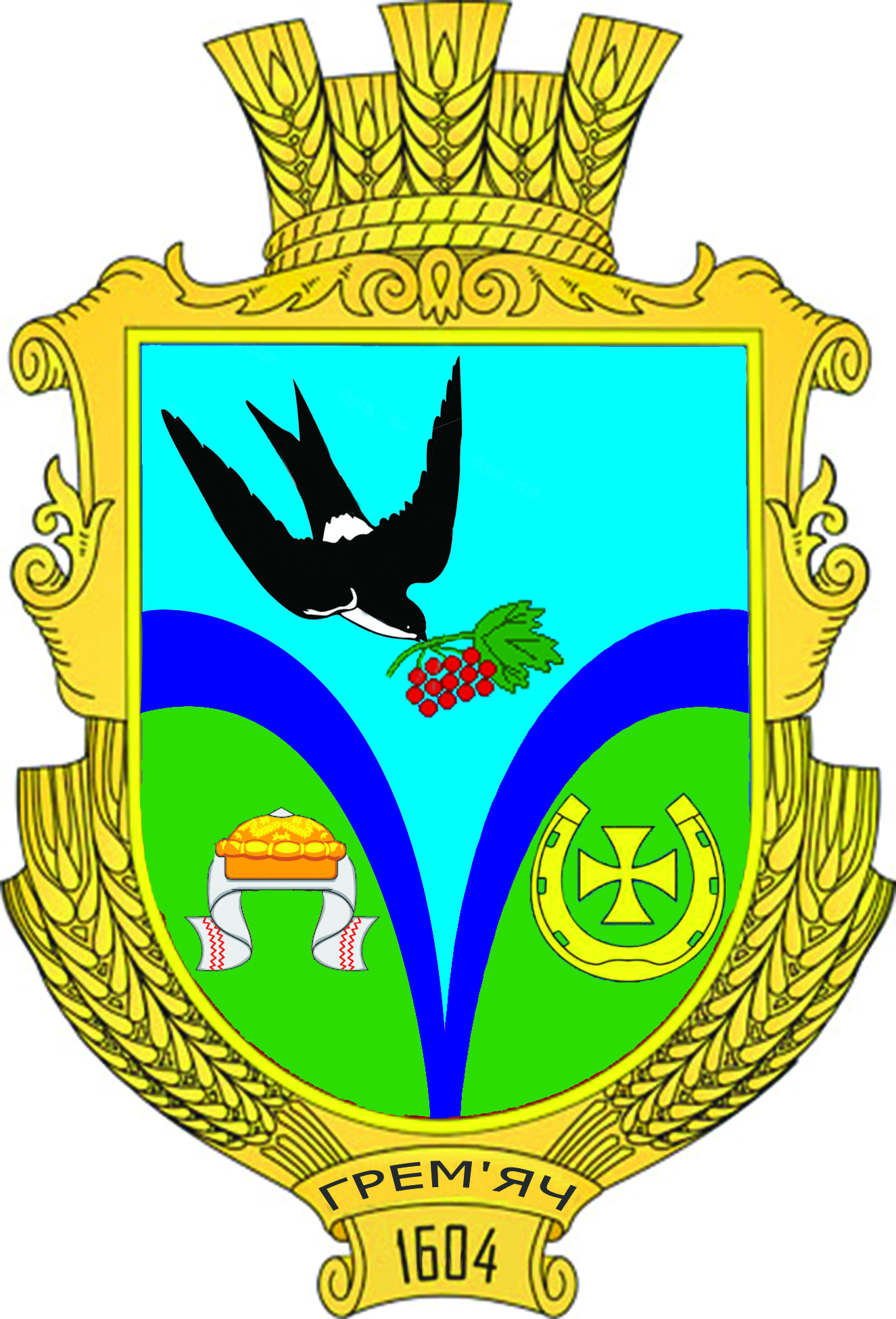 Затверженний герб с. Грем`яч